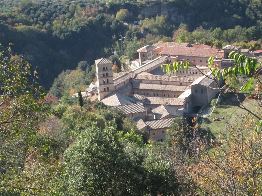 Vue aérienne de l'abbaye de Sainte-Scolastique à Subiaco, Latium, Italie.